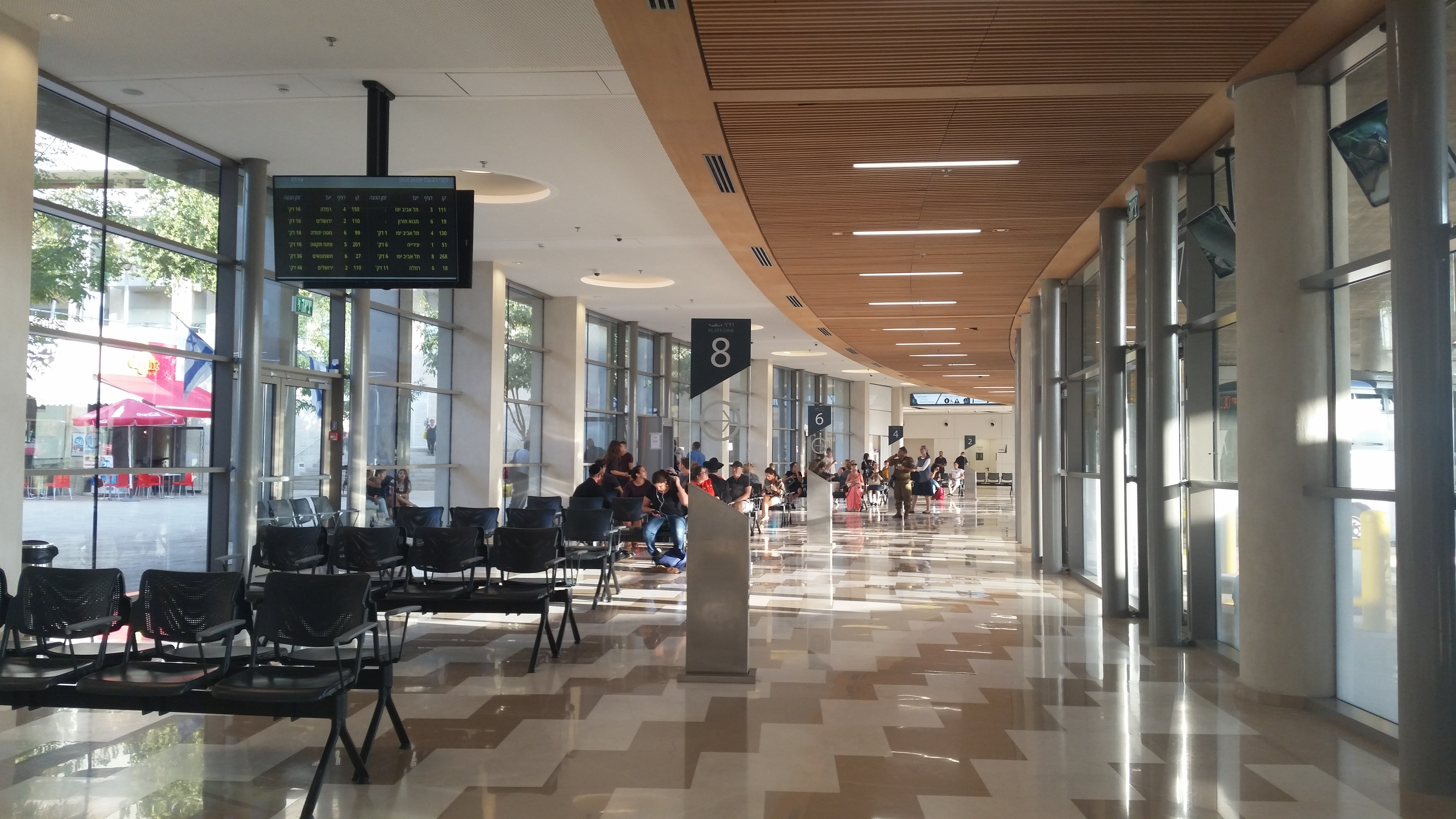 תחנה מרכזית מודיעין